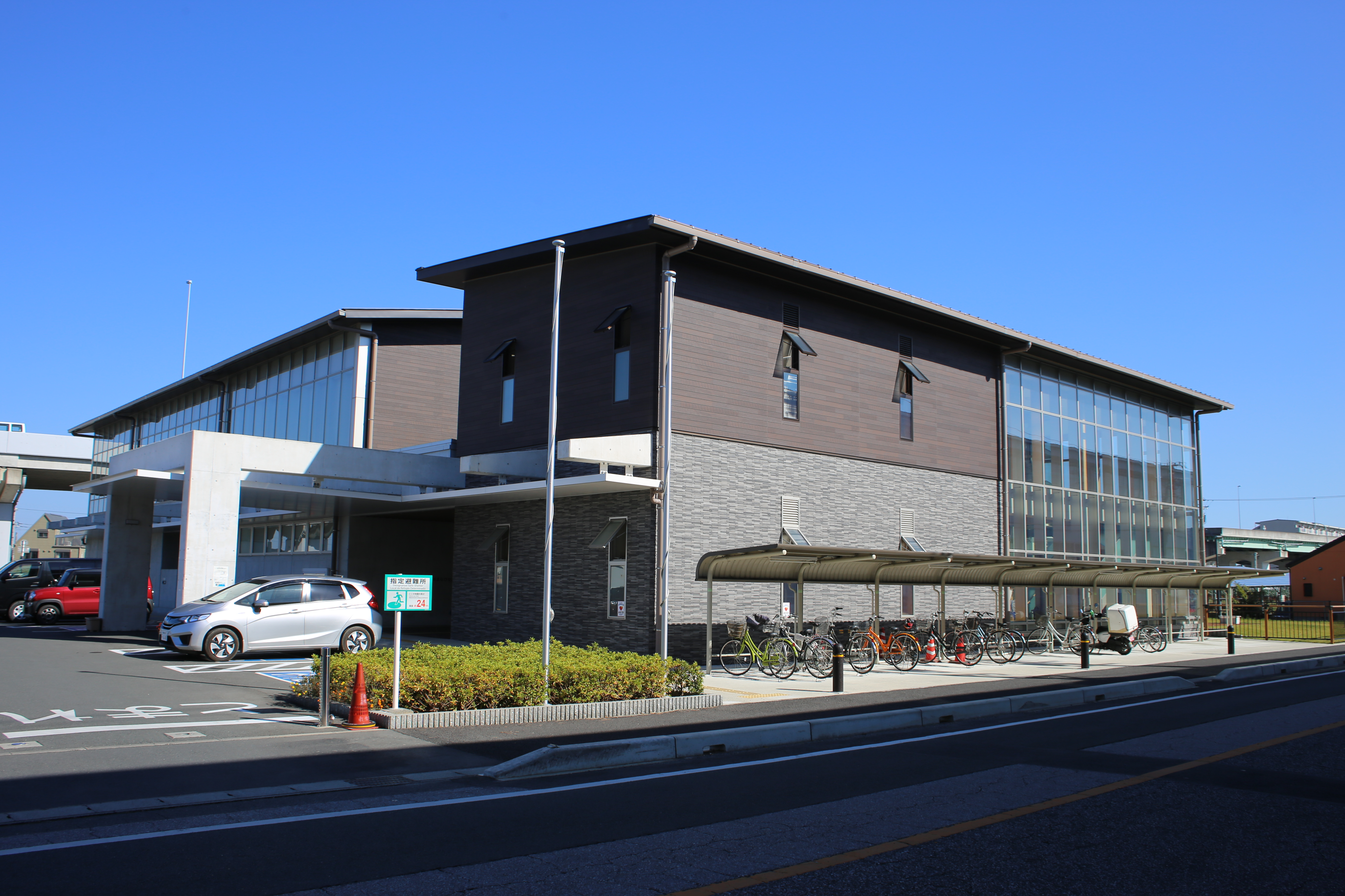 愛知県豊橋市大清水町の「ミナクル」